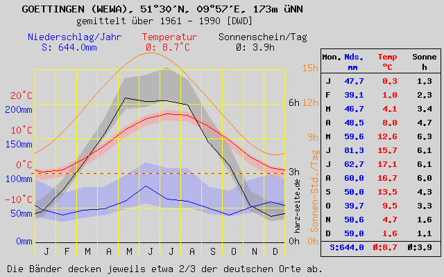 Das Klimadiagramm für Göttingen basieren auf den frei zugänglichen Messdaten des Deutsche Wetterdienstes. Sie wurden zwischen 1961 und 1990 erfasst und gemittelt. Jeder Monatswert der Tabelle ist also der Mittelwert über einen Zeitraum von 30 Jahren. Folgende Monatswerte sind vorhanden: die Niederschlagsmenge in mm/Monat die Sonnenscheindauer in Stunden/Tag die Temperatur in °C Zusätzlich ist in Orange die Breitengrad abhängige Zeit zwischen Sonnenaufgang und -untergang in Std./Tag angegeben. Die Formel basiert auf der Facharbeit von T. Raffler. Die Linien geben die Monatswerte des gewählten Ortes an. Um diese Ortsdaten innerhalb Deutschlands vergleichbar zu machen, sind die Bänder hinzugefügt. Sie enthalten den deutschen, mit einer Streuung überlagerten, Durchschnittswert. Die Steuung ist derart gewählt, dass sich etwa 2/3 der deutschen Orte in dem jeweiligen Band befinden: (Mittelwert ± Standardabweichung). Liegt die Linie innerhalb eines Bandes, so verhält sich der Ort bezüglich seiner Monatswerte, wie 2/3 der deutschen Orte, also "normal". Starke Abweichungen finden wir z.B. in den Bergen mit viel Niederschlag oder an der Nordsee mit antizyklischem Niederschlag. Arithmetischer Mittelwert ± Standardabweichung . Die Sonnenstunden sind, Breitengrad abhängig, die Differenz zwischen Sonnenaufgang und -untergang.